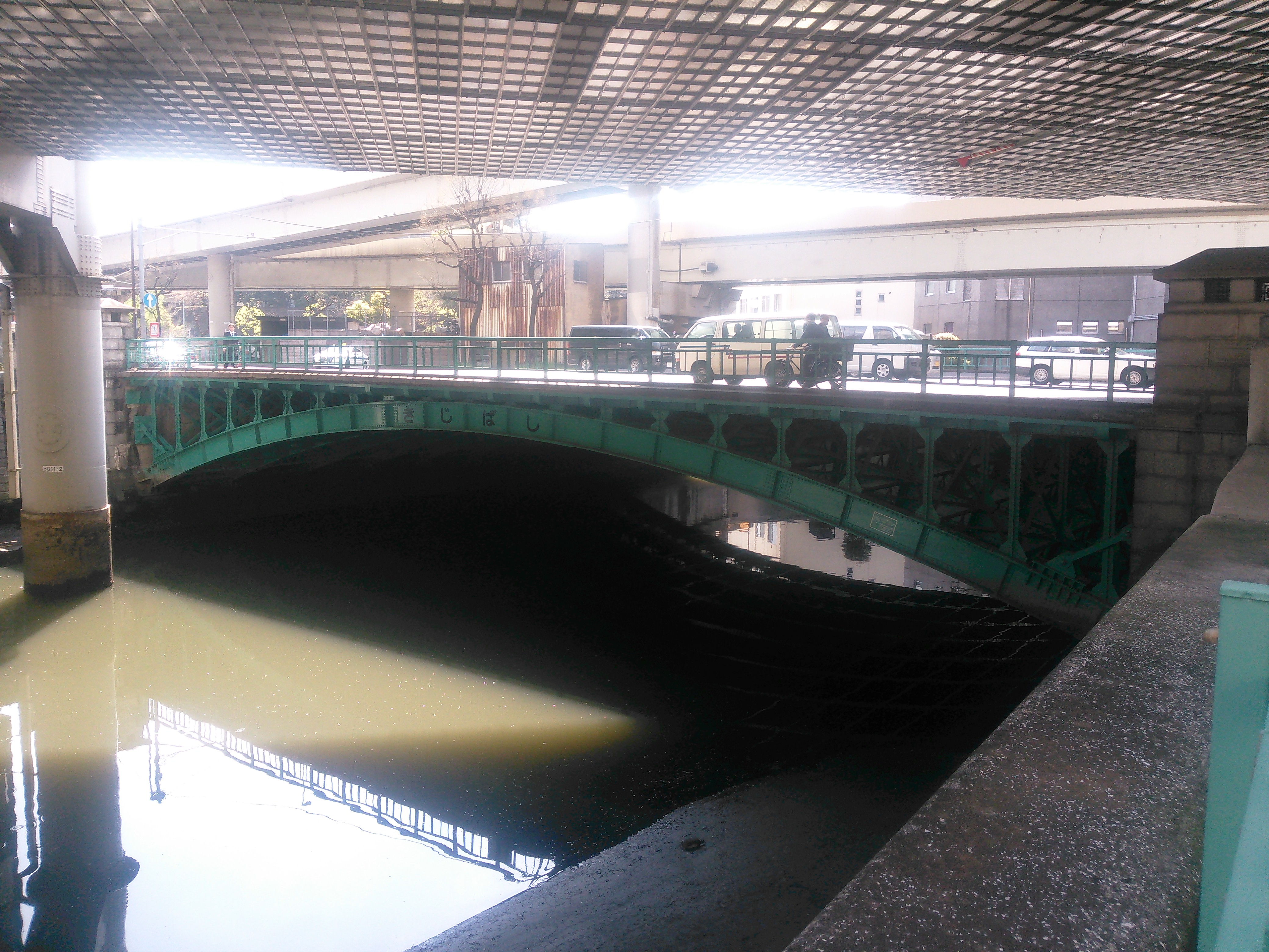 東京都千代田区、日本橋川に架かる雉子橋